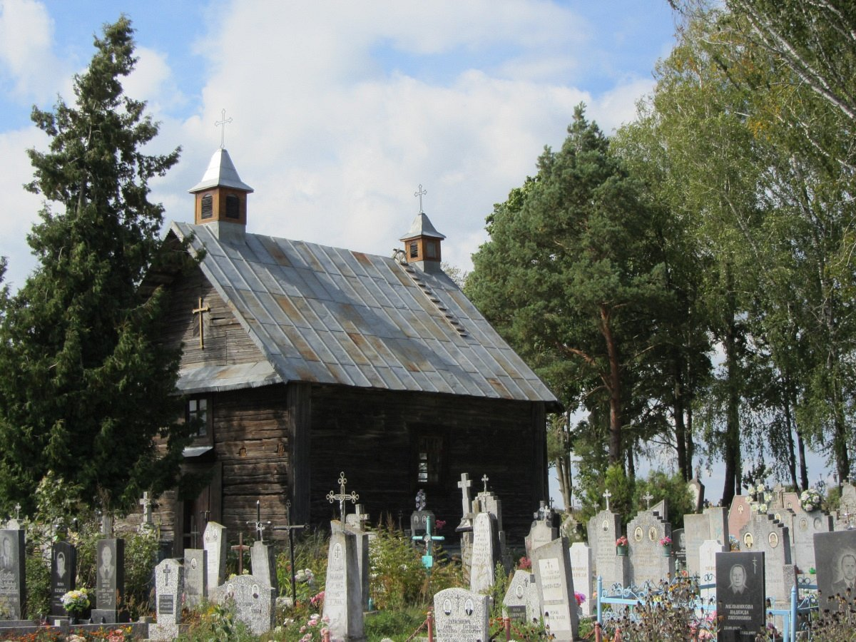 Ліпнішкі. Капліца на могілках